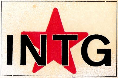 INTG (primeiro logo)